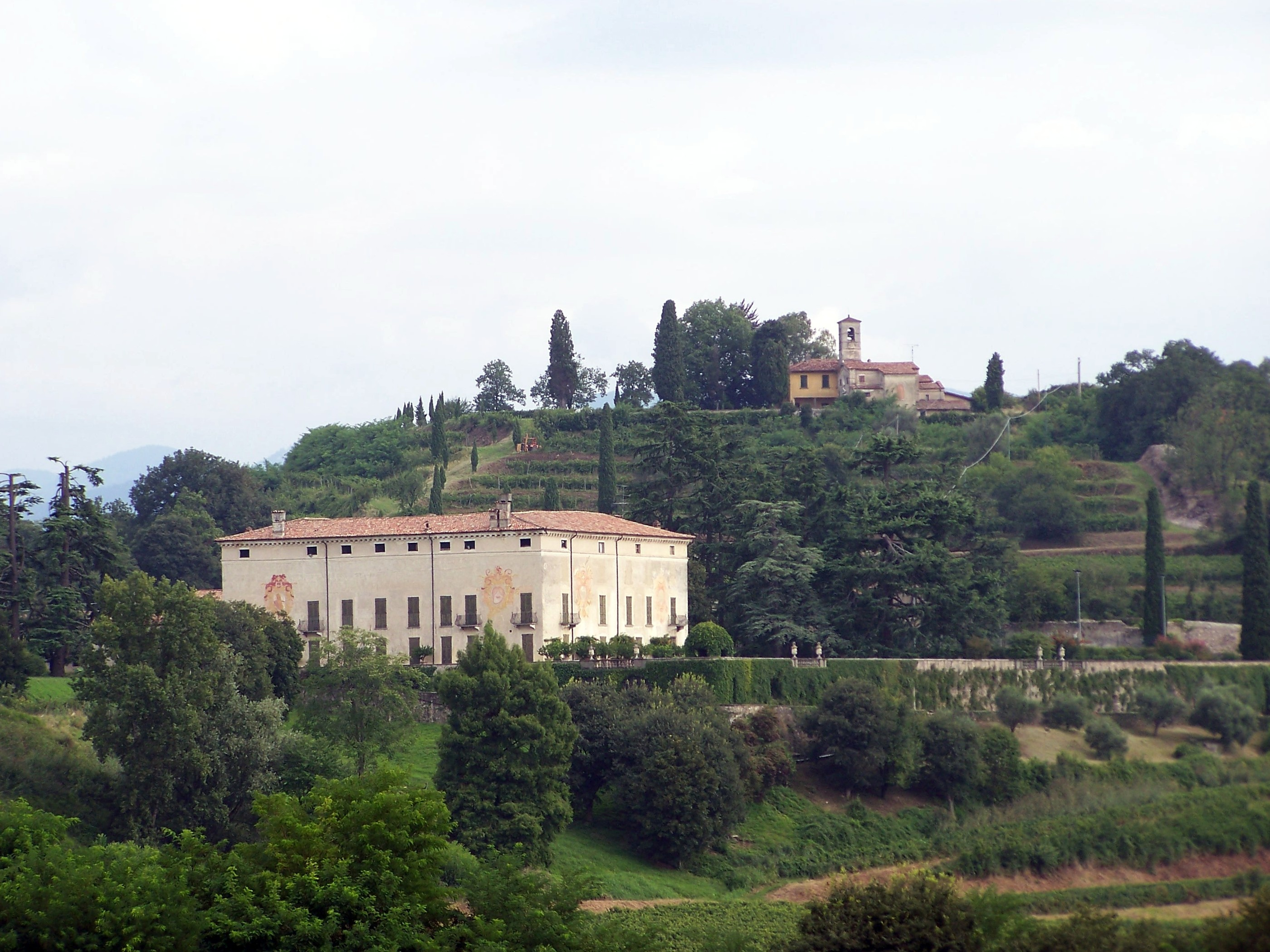 Il Palazzo Calini Grande e il Santuario di Santo Stefano visti dalla chiesa parrocchiale di San Michele Arcangelo.